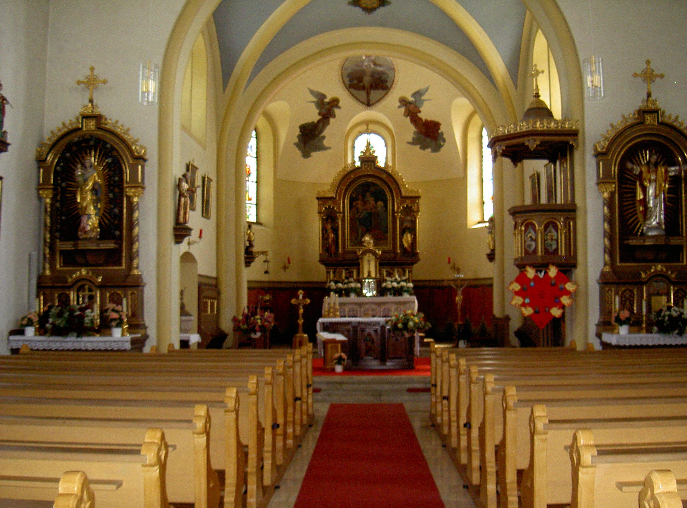 Hiltersried Kirche innen